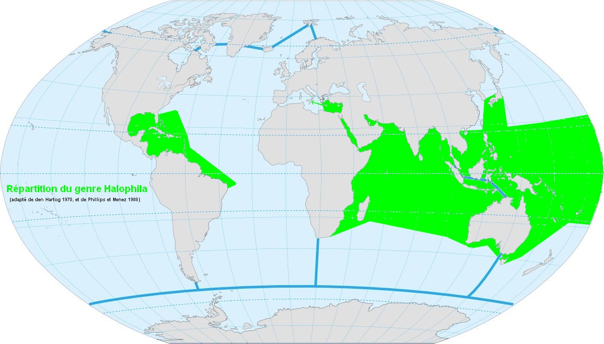 Répartition mondiale du genre Halophila (adapté de den Hartog 1970, et de Phillips et Menez 1988